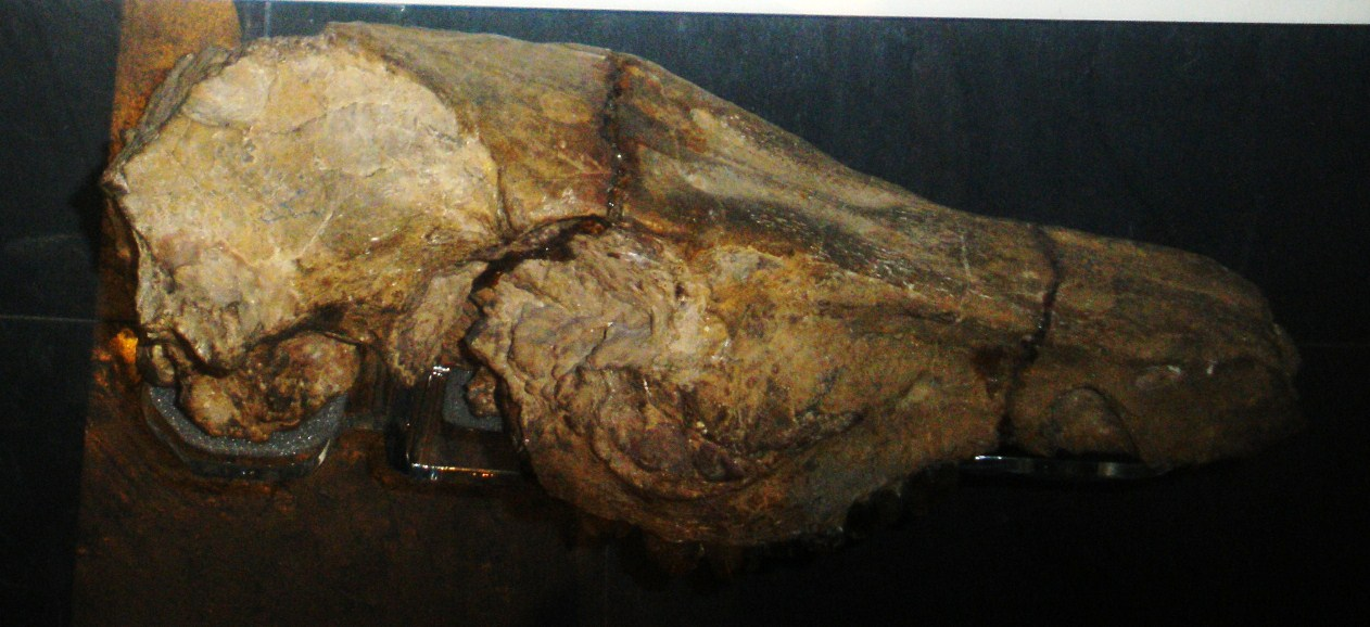 Fossil of Hippohyus, an extinct mammal -- Took the photo at Natural History Museum, London